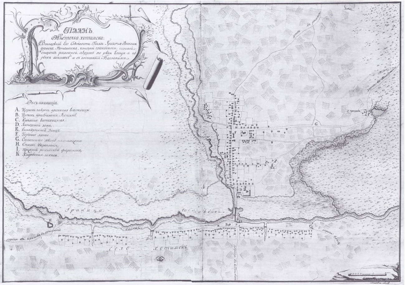 Хоцімск. План канца XVIII ст. (РДВГА)Беларуская (тарашкевіца): Хоцімск (Chocimsk)